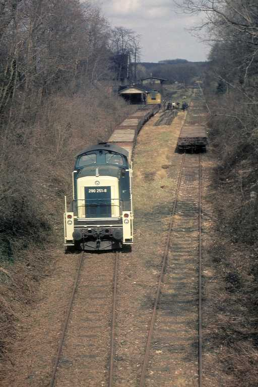 Bahnhof Wassenberg 25.3.1985 * Quelle: Sammlung B.Dohmen, Archiv-Nr. 71/28 * Fotograf: Benedikt Dohmen, User:Benedictus * Copyright Status: GNU Freie Dokumentationslizenz